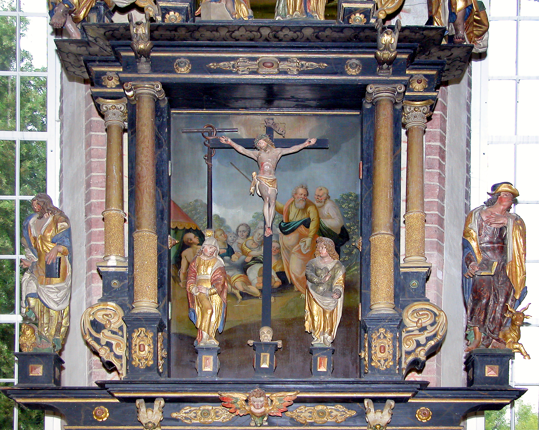 03.08.2007 01662 Meißen-Zscheila, Werdermannstraße 25: Ev-Luth. Trinitatiskirche Zscheila (GMP: 51.171379,13.491264). Zwischen 1240 und 1260 wurde die vorherige Kapelle auf dem heutigen Altarraum und die Vierung davor vergrößert. Die Kirche war dem Hl. Georg geweiht. 1512 sowie 1655 - 1670 fanden weitere Bauarbeiten statt. Aus dieser Zeit stammt auch der von Valentin Otte aus Meißen geschnitzte Altar. [DSCN28824.TIF]20070803030DR.JPG(c)Blobelt